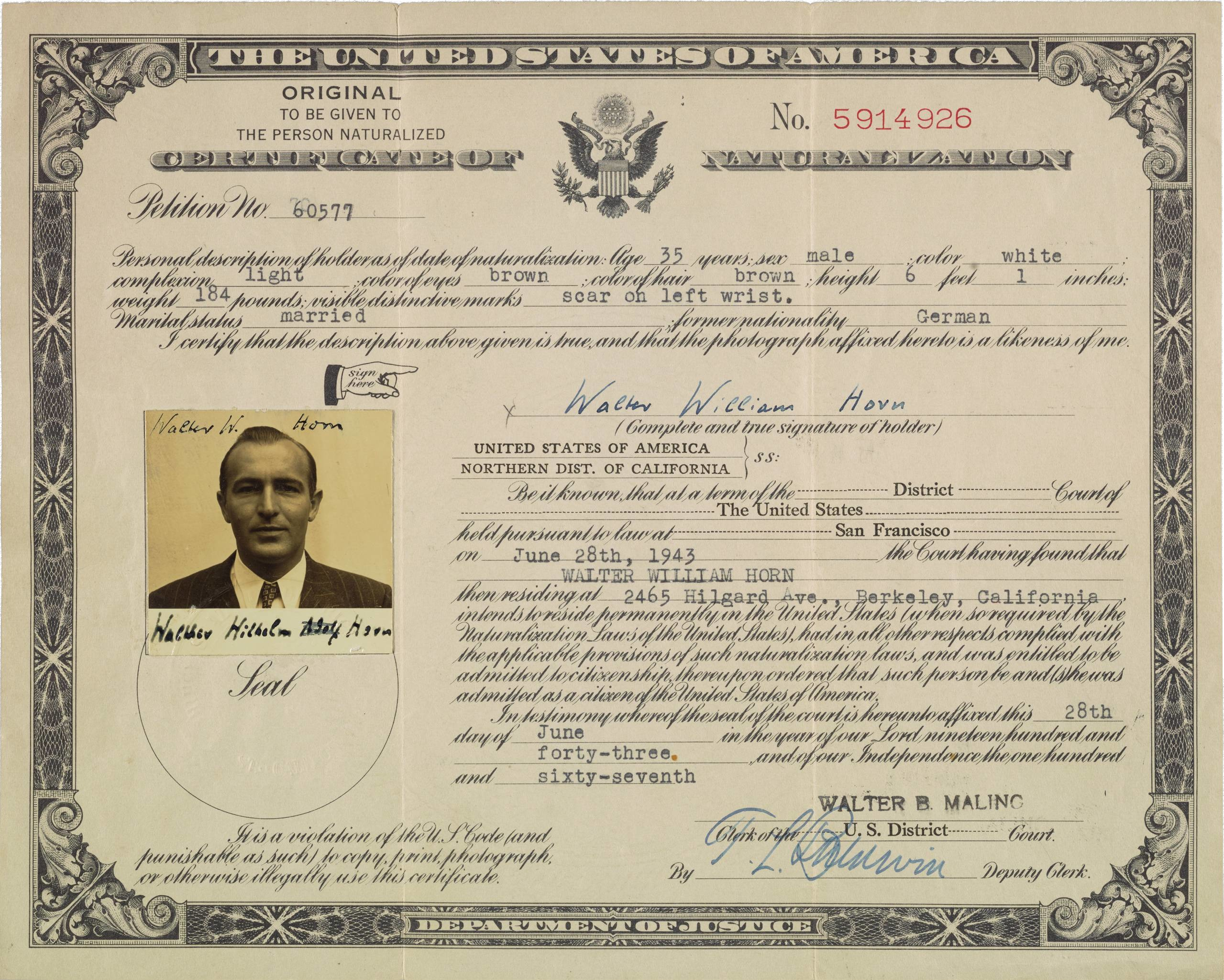 United States naturalization certificate for Walter William Horn 1943